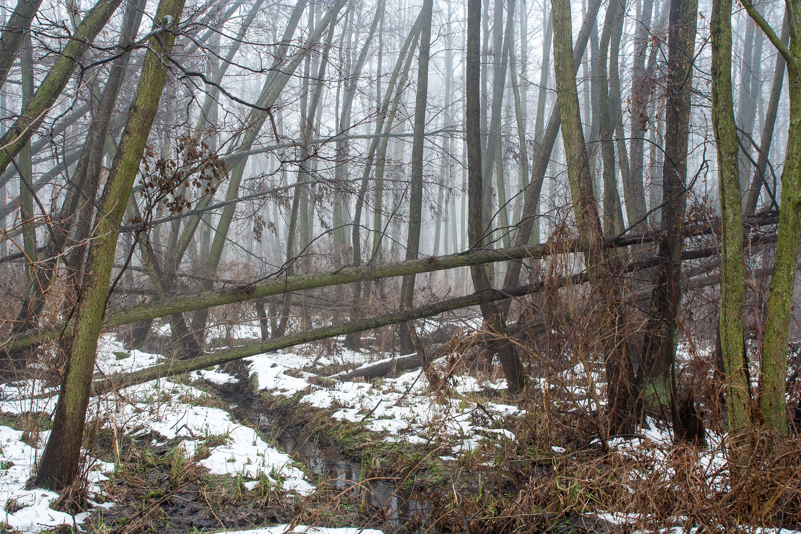 Zakole Wawerskie w Warszawie, las olchowy.